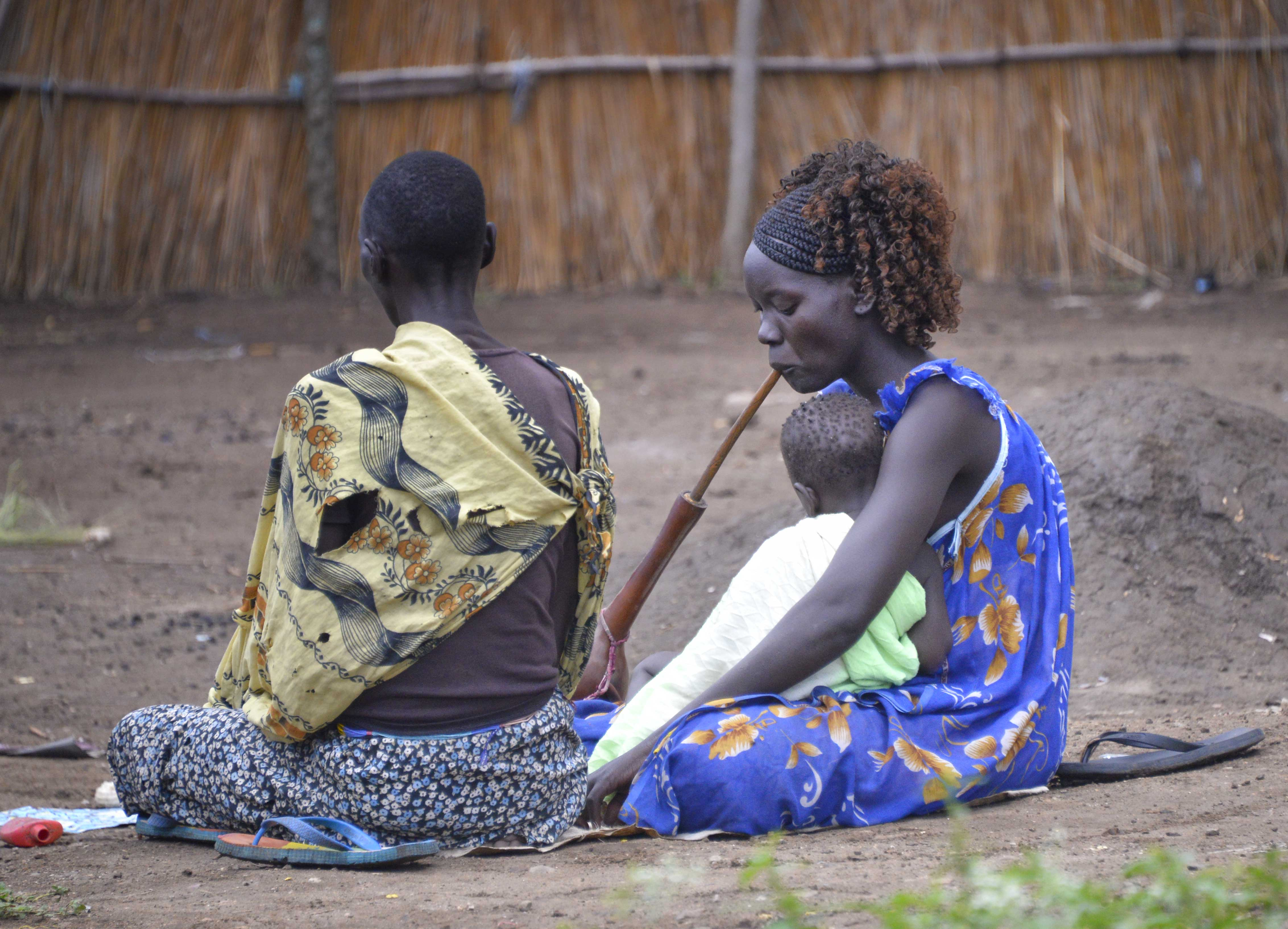 Ethiopia